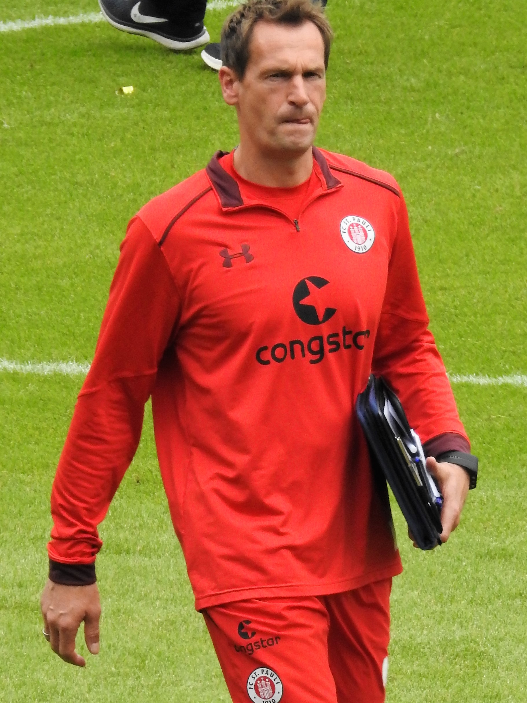 Mathias Hain FC St.Pauli Torwarttrainer